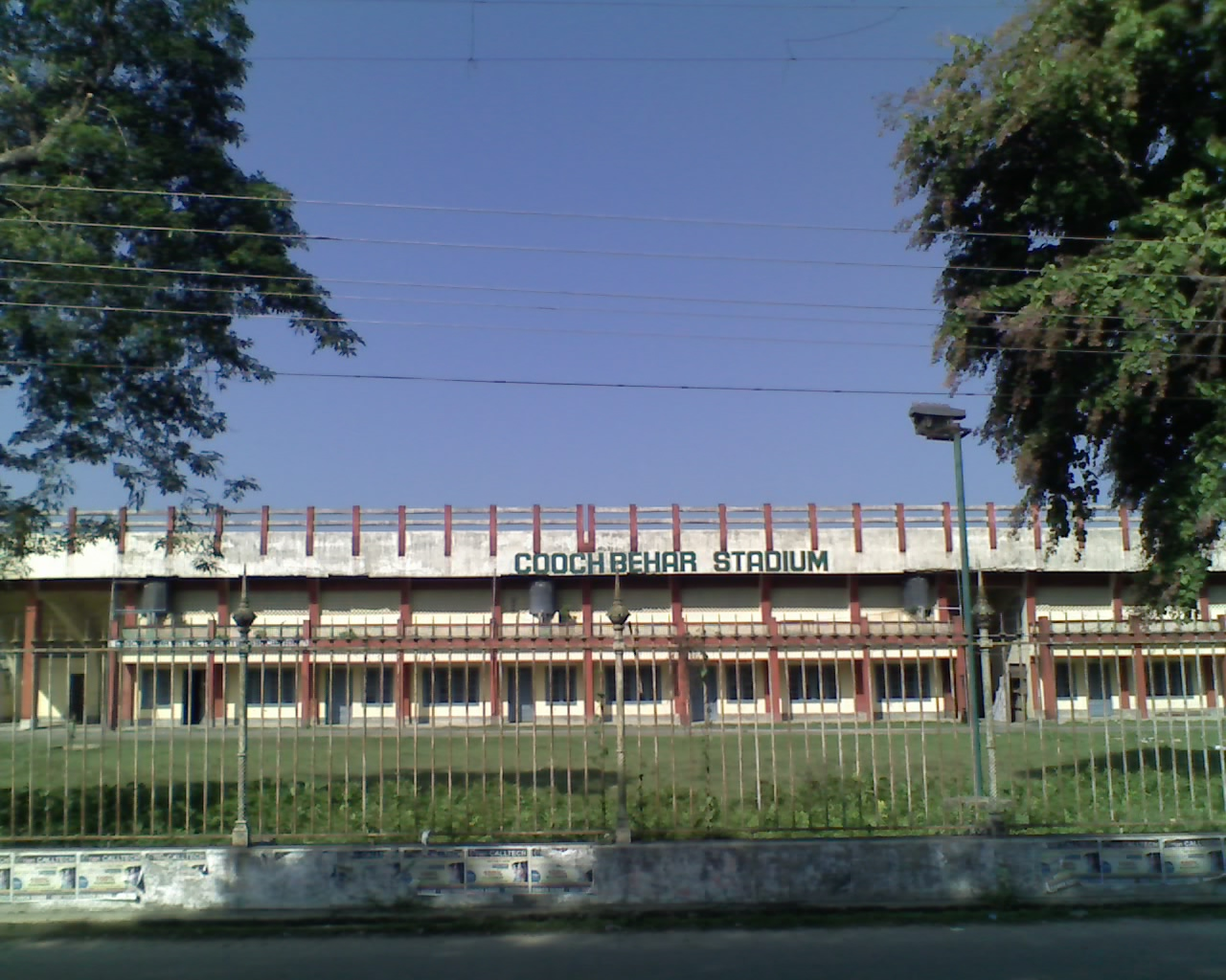 Cooch Behar Stadium, Cooch Behar, India